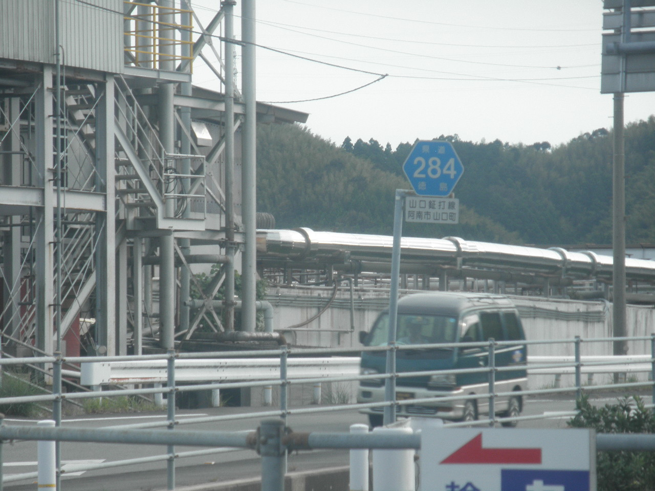 徳島県阿南市山口町森国 徳島県道284号山口鉦打線[